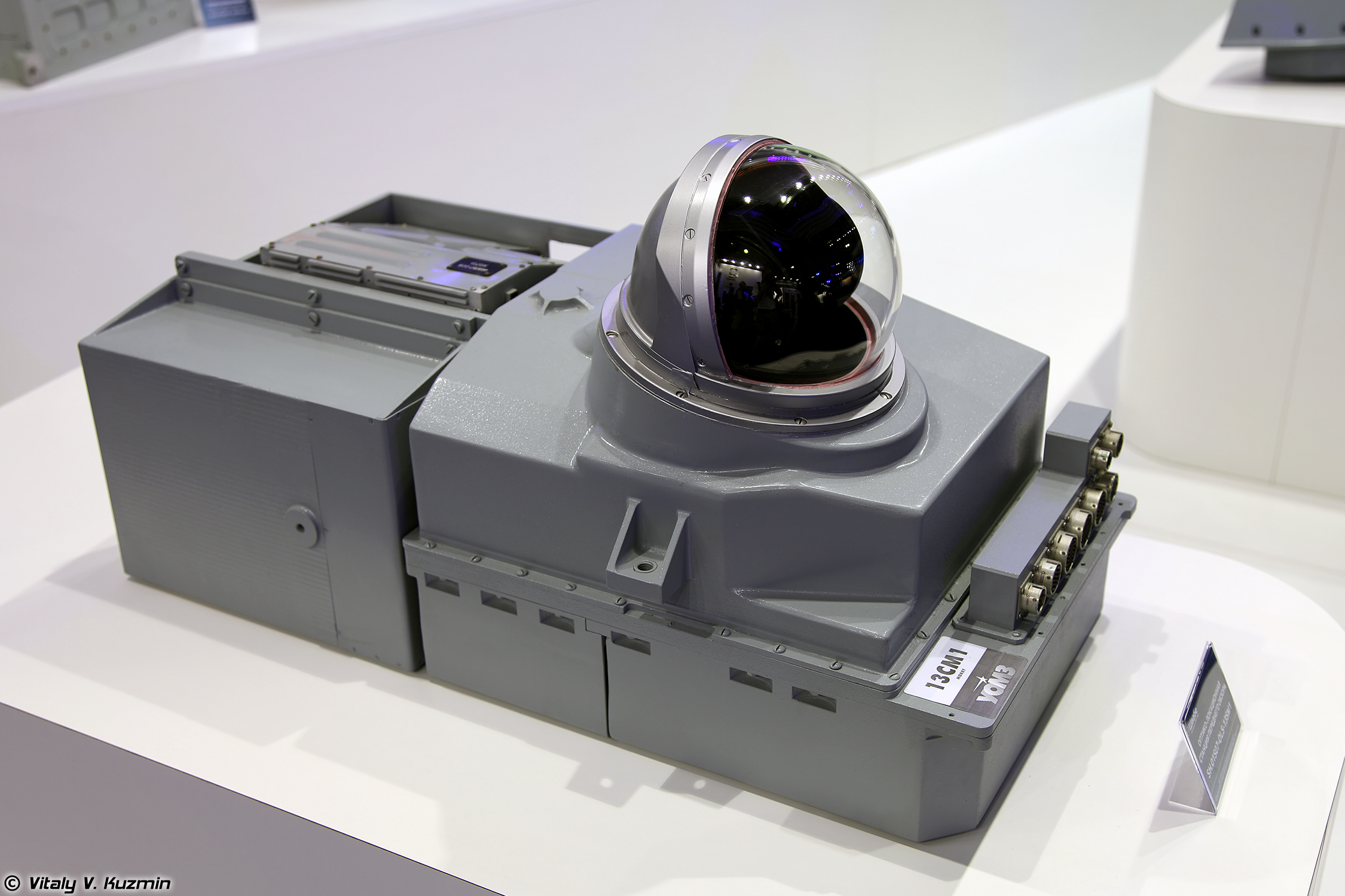 Оптико-локационная станция 13СМ-1 (Optical-location station 13SM-1)